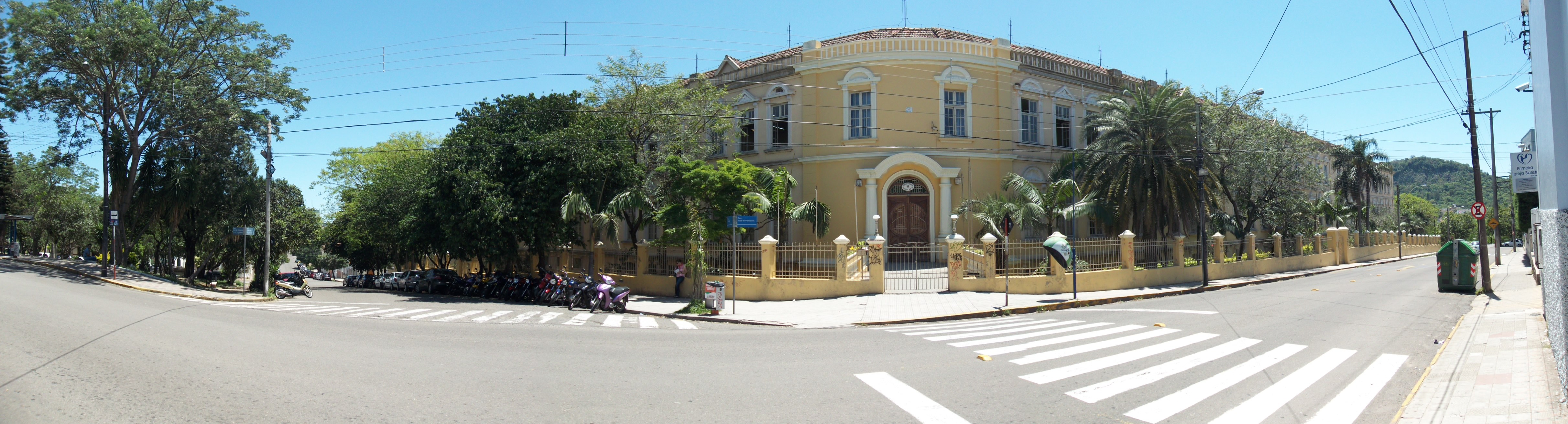 Panorama Escola Manoel Ribas, em Santa Maria / RS, Brasil